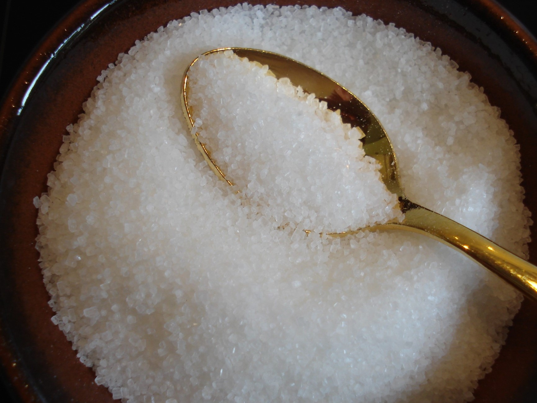 sucre